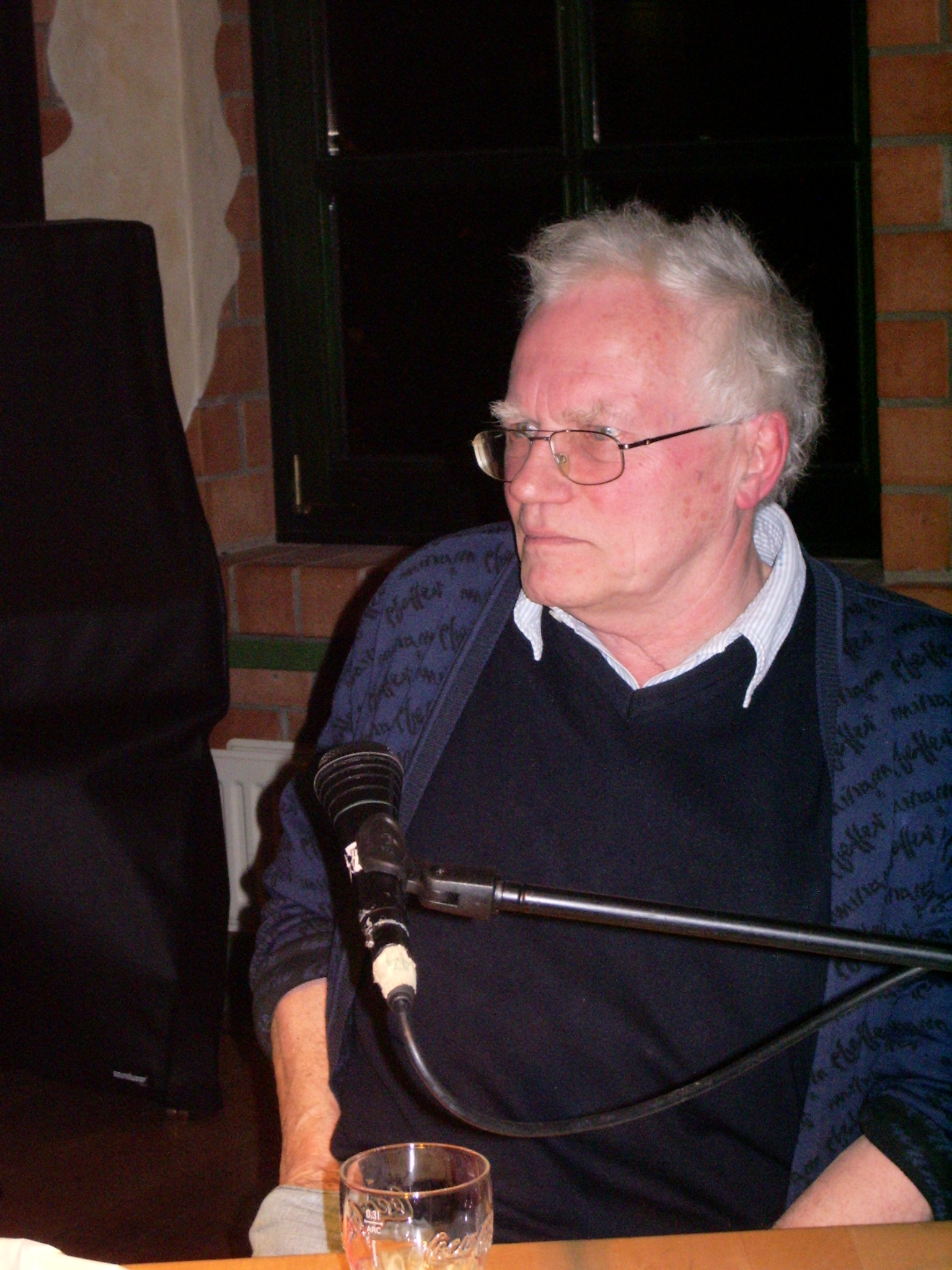 Der emeritierte Prof. Dr. Arno Klönne bei einer Veranstaltung des Linken Forums Paderborn als Vortragender zum Thema Marx - ein „toter Hund“? - Zur Aktualität des Marxismus in der Kulturwerkstatt Paderborn am 22. Januar 2008.